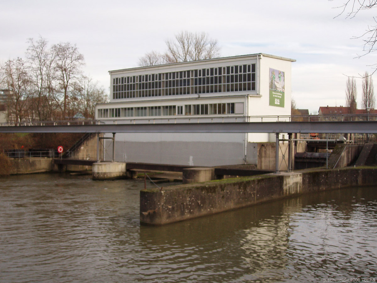 Wasserkraftwerk der ZEAG aus den 1950er Jahren am Neckar in Heilbronn